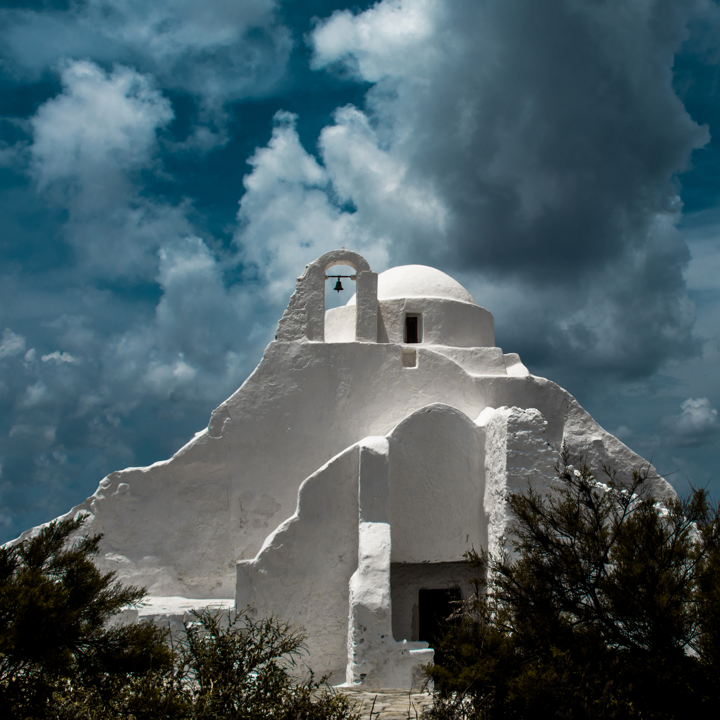 Παραπορτιανή«Παραπορτιανή»